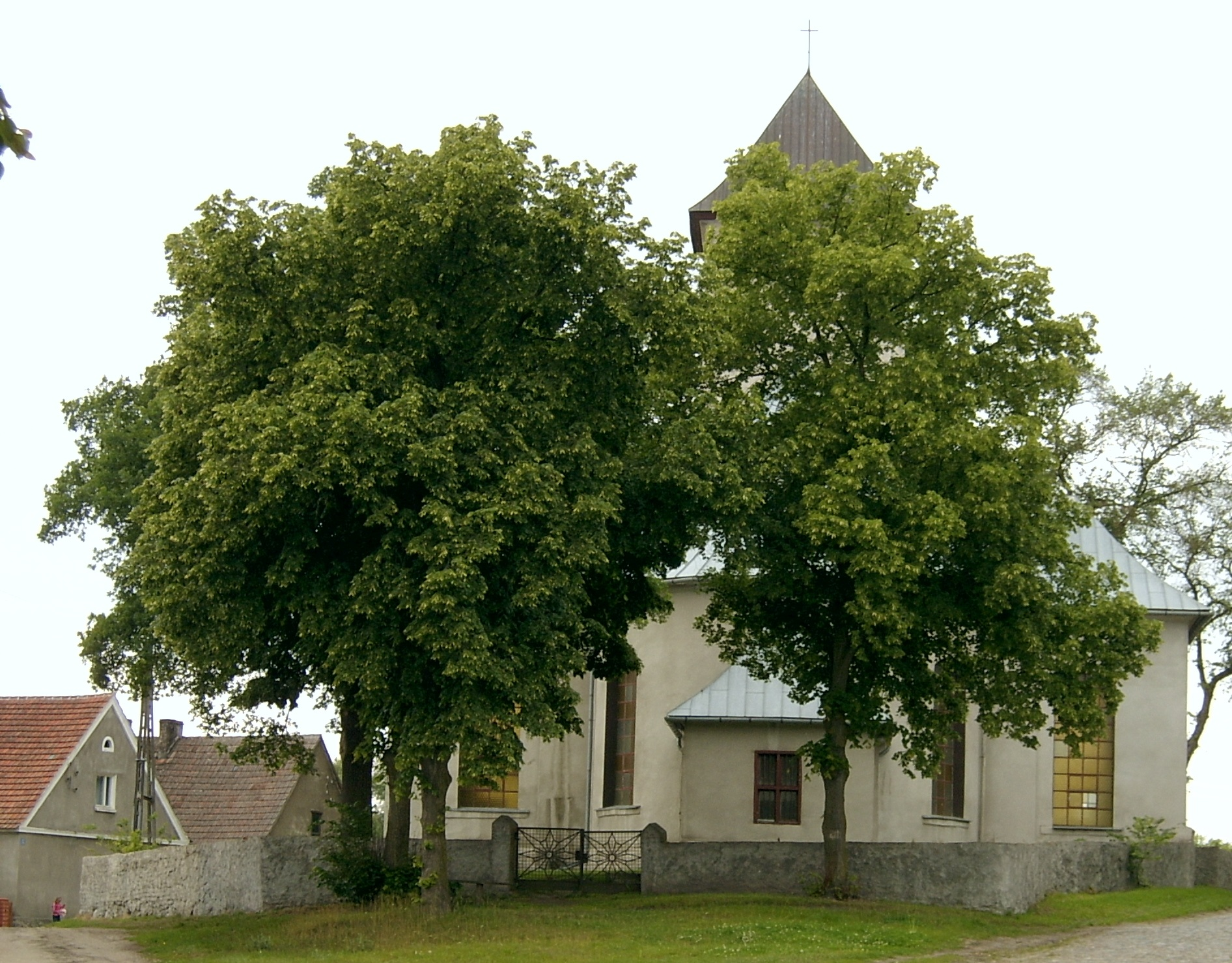 Kirche in Rybocice